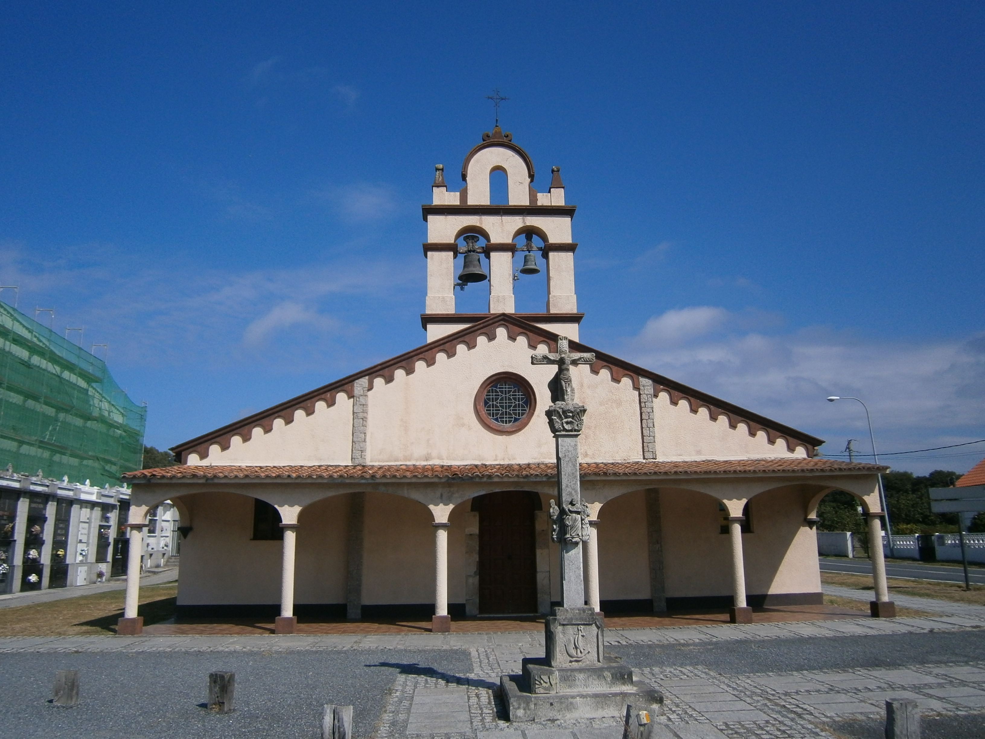 Igrexa parroquial de San Xulián de Serantes (Oleiros)